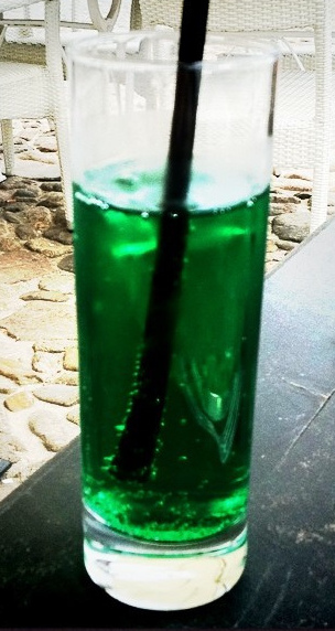 Le diabolo menthe